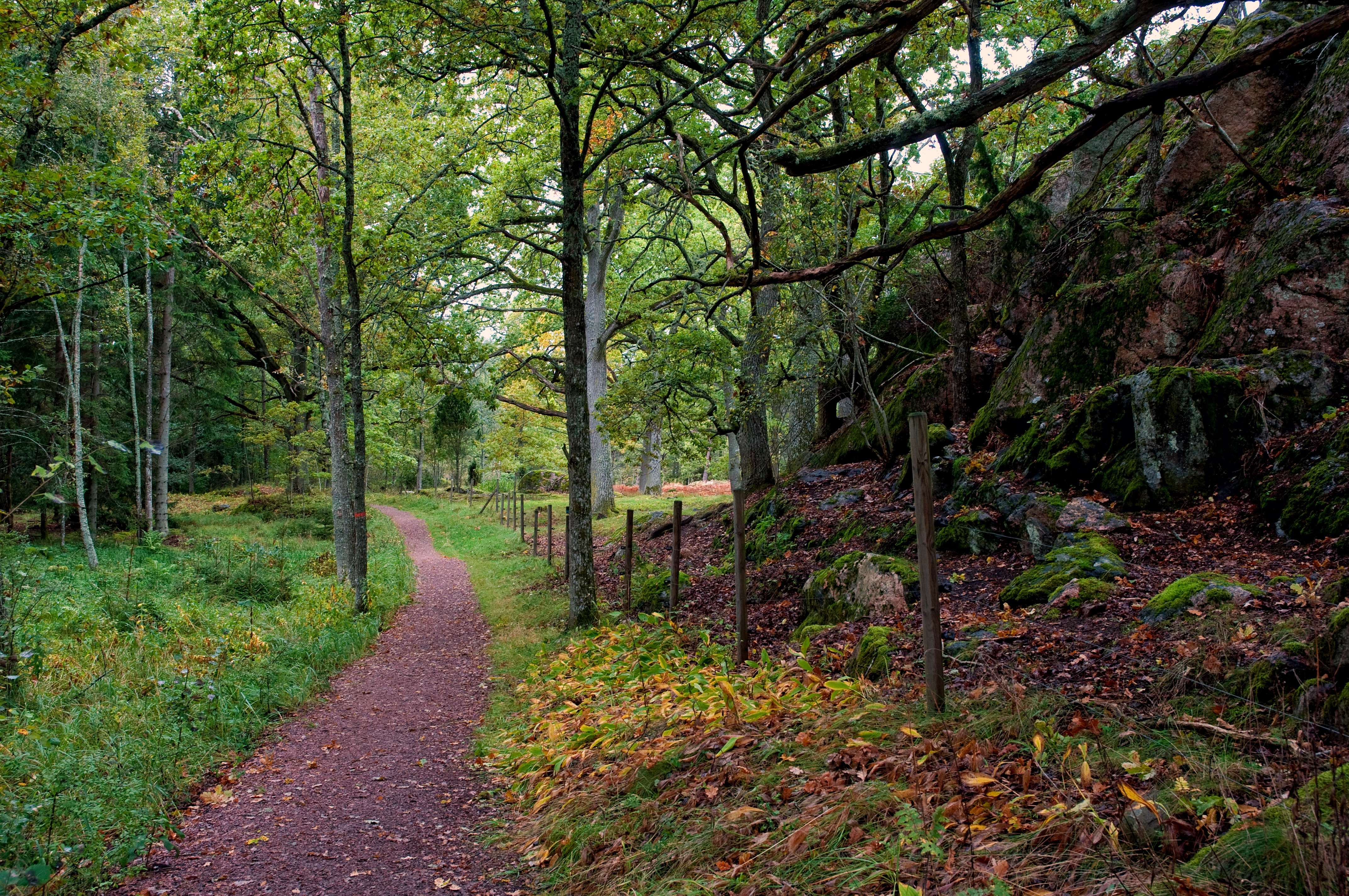 Femöre naturreservat i Oxelösunds kommun